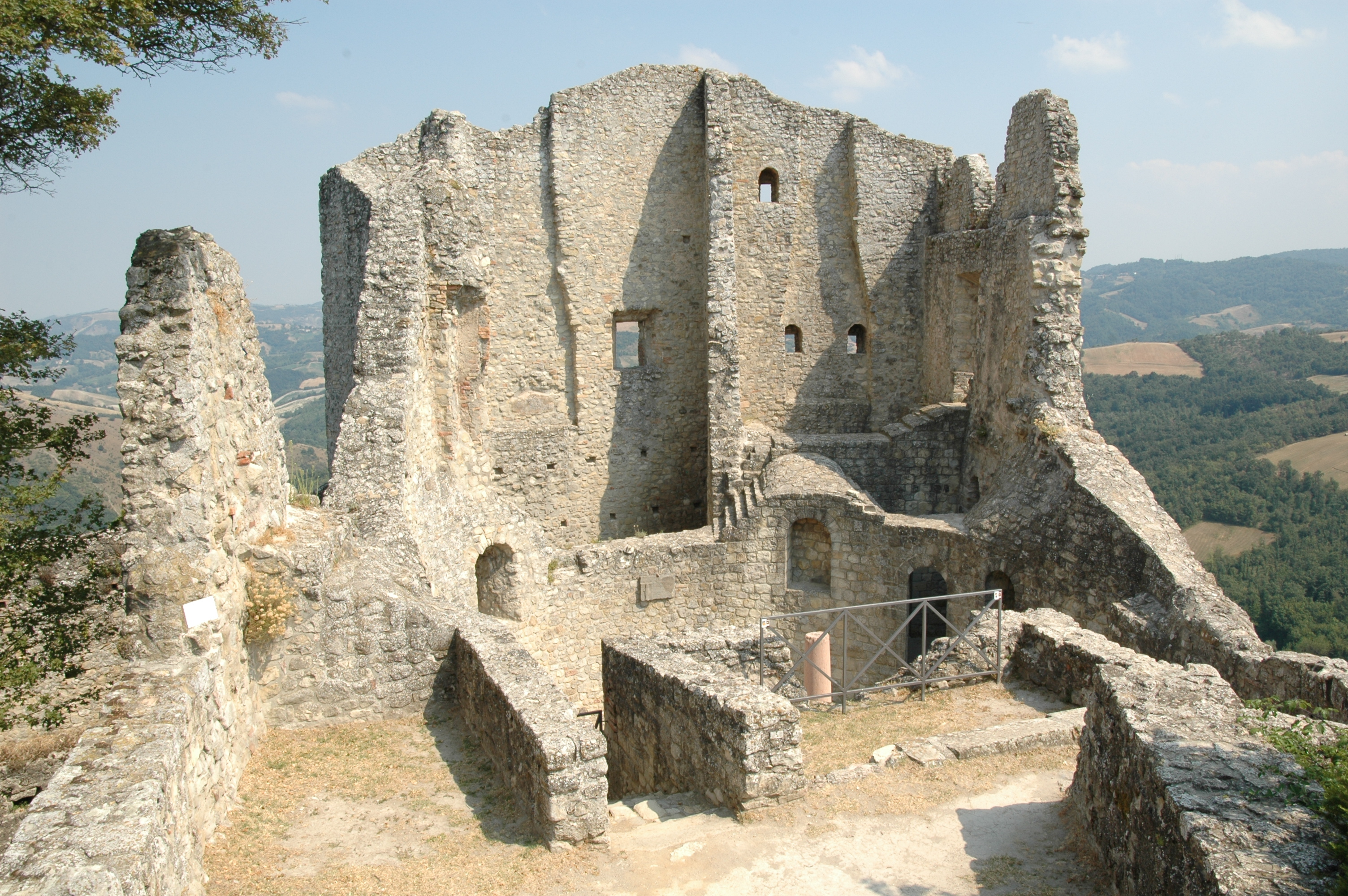 Castello di Canossa (Reggio Emilia)